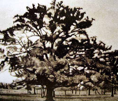 Беларуская (тарашкевіца): Грушава (Hrušava), сядзіба Радзевічаў (Radzievič). Дуб Дэвайціс (Devajcis)